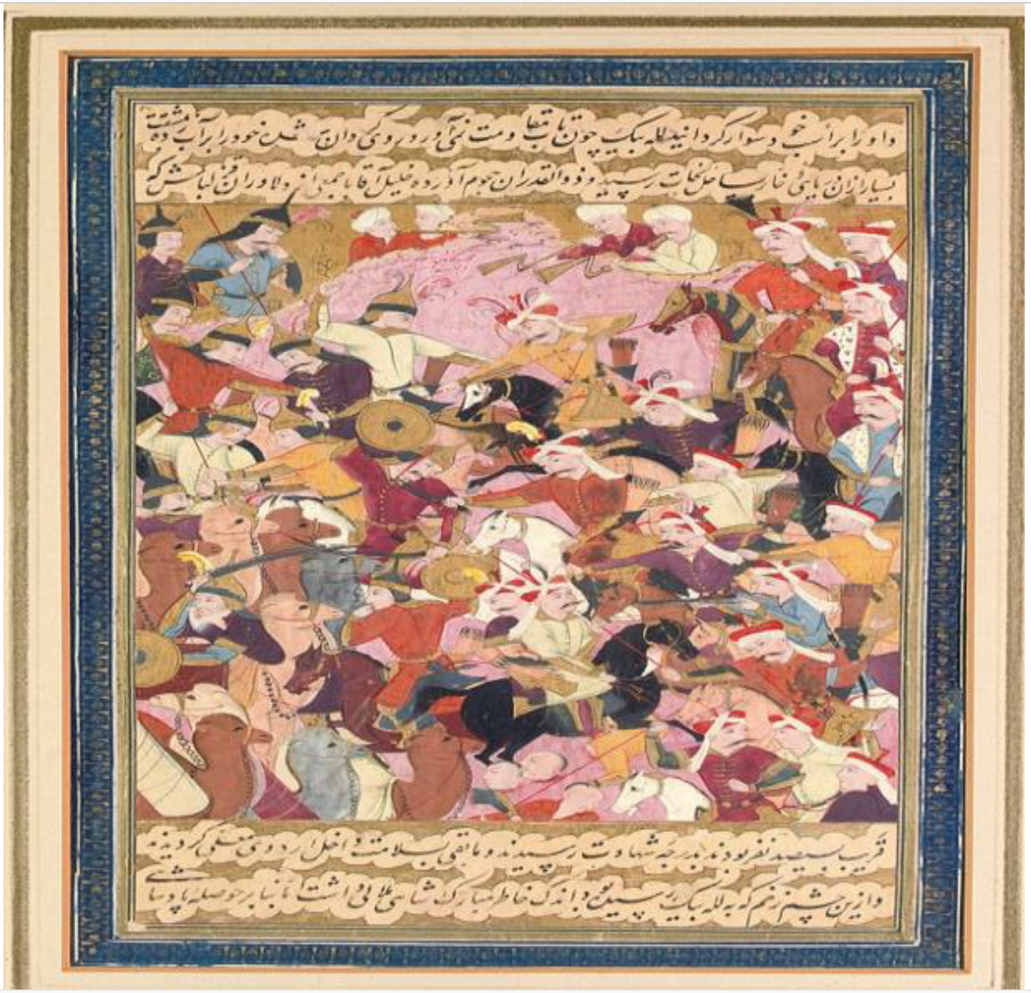 Sarı Kaplan’ın Lala Hüseyin Bey ile savaşması (“Cihângüşâ-yi Hâkân”, v.257)